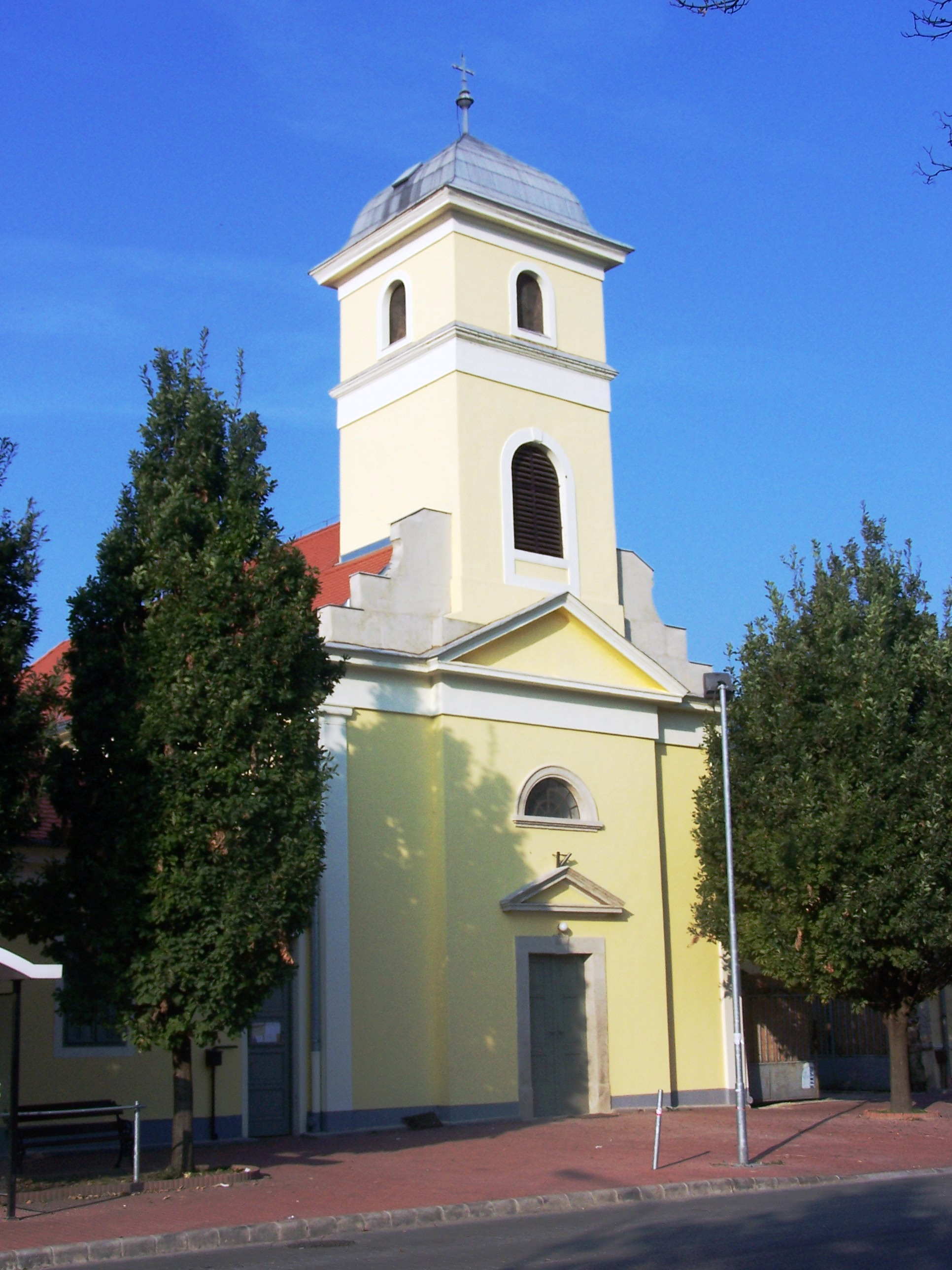 Római katolikus templom (Biatorbágy, Bia, Vörös Hadsereg útja) This is a photo of a monument in Hungary, Identifier: 6909